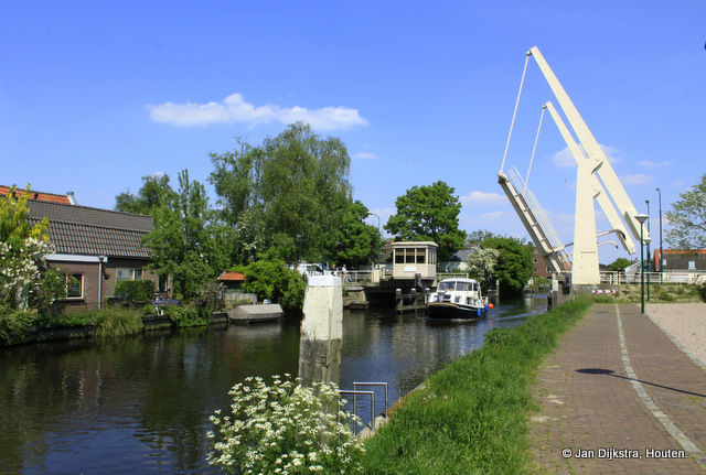 Het Jaagpad waar langs de trekschuit vroeger over de Oude Rijn werd getrokken.